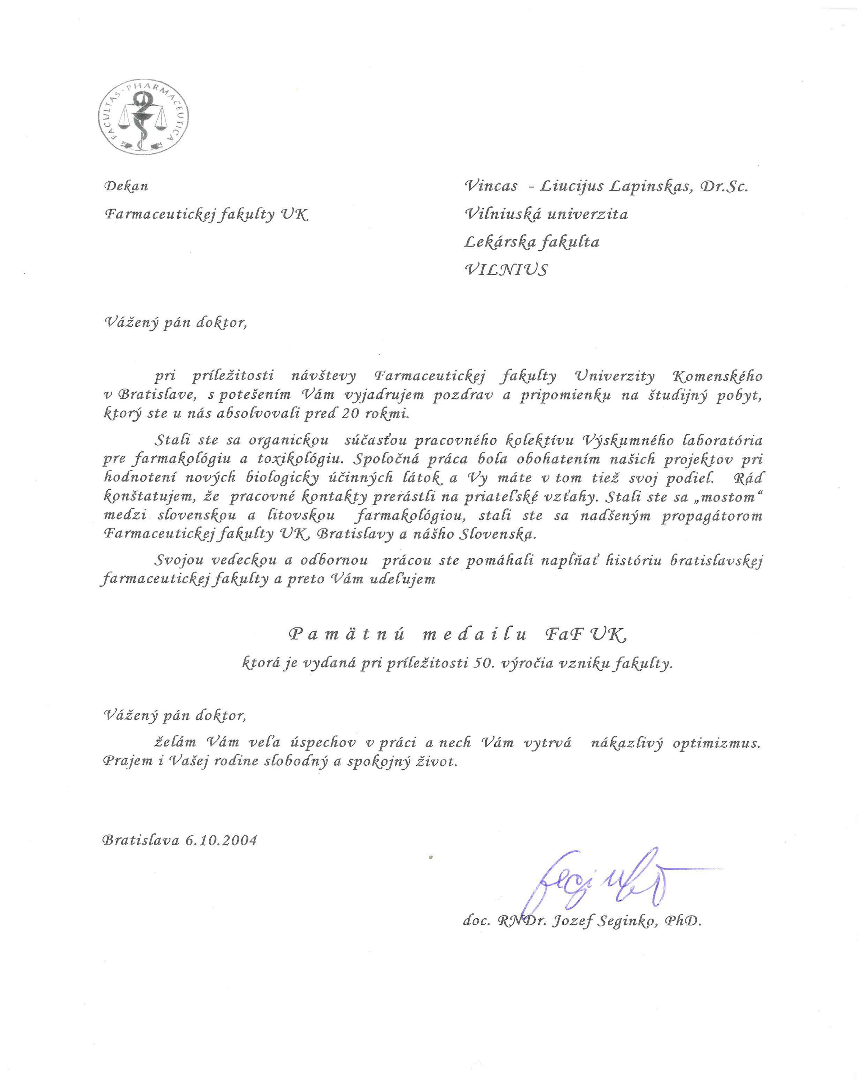 Diplom k udělení památné medaile k 50. výročí vzniku Farmaceutické fakulty Univerzity Komenského v Bratislavě Vincovi L. Lapinskovi, Dr. Sc. Udělil děkan fakulty doc. RNDr. Jozef Seginko, PhD.